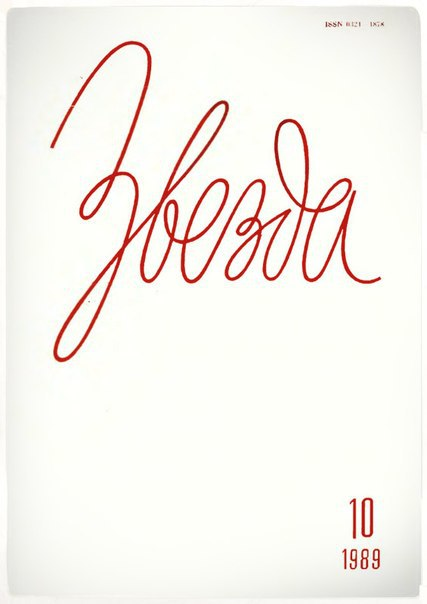 Обложка 10 выпуска журнала "Звезда".